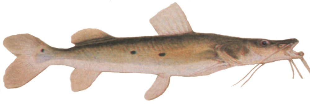 Desenho de um jurupoca - jiripoca ou jerupoca (Hemisorubin platyrhynchos), por Johann Natterer, parte da missão ao Brasil de naturalistas do imperador austríaco Francisco I, de 1817 a 1835